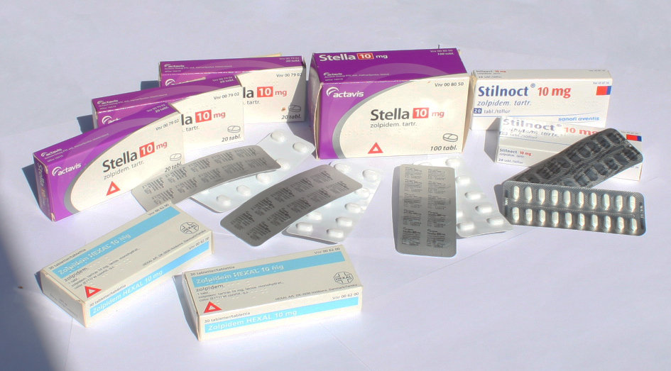 Tsolpideemiin perustuvia lääkkeitä